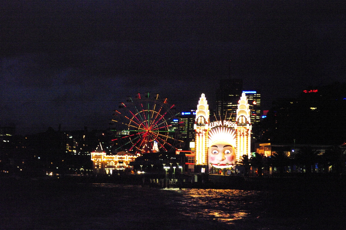 Lunapark, Sydney, Australien